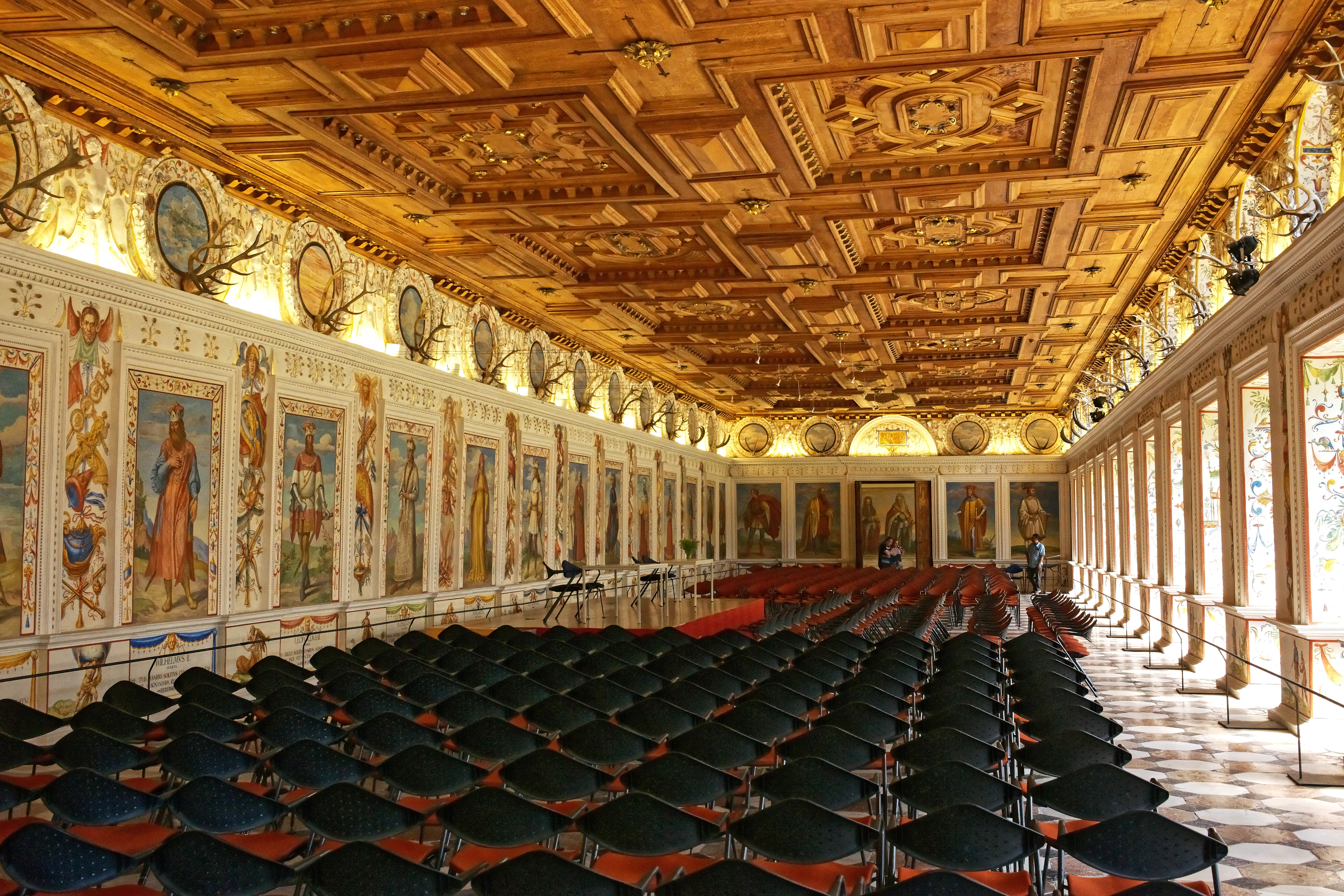 Exponate im Museum von Ambras Castle